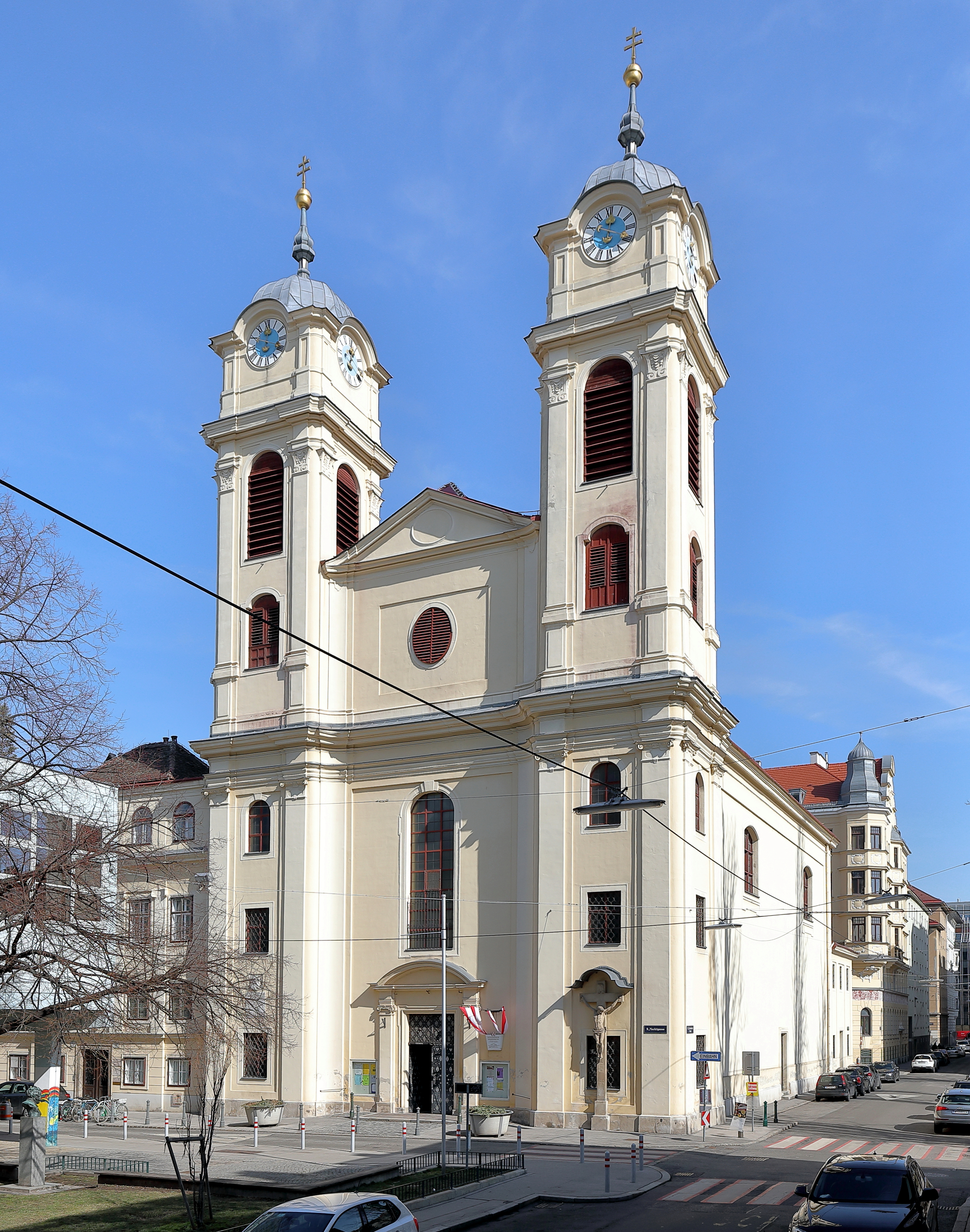 Die röm.-kath. Lichtentaler Pfarrkirche, auch als Schubertkirche bezeichnet, im 9. Wiener Gemeindebezirk Alsergrund. Die Grundsteinlegung der barocken Kirche fand durch Kaiser Karl VI. 1712 statt und am 25.September 1714 wurde darin die erste Hl. Messe gefeiert, jedoch erst 1730 geweiht. Von 1769 bis 1773 wurde die Kirche vergrößert, wobei die Fertigstellung des Nordturmes erst 1830 erfolgte.